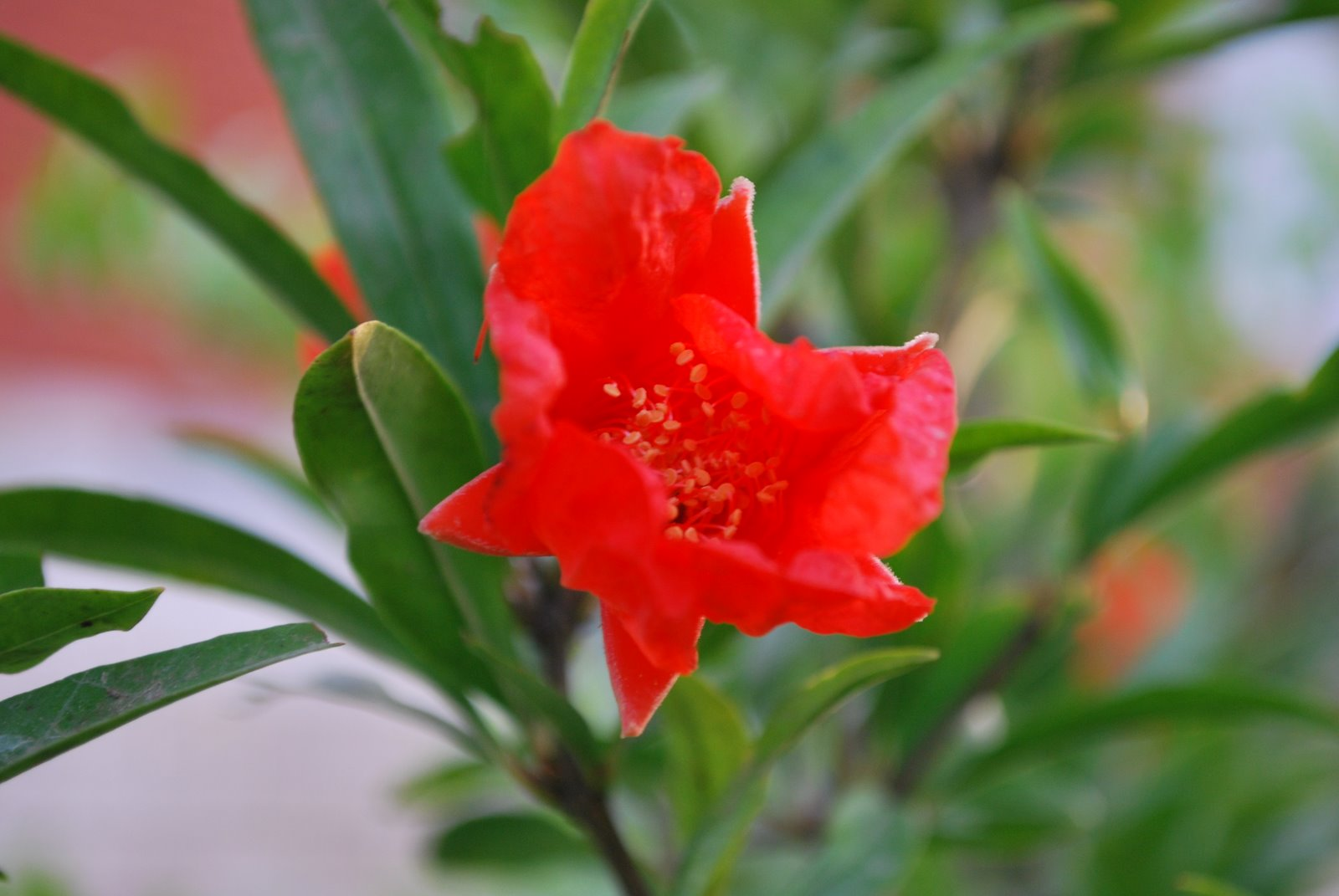 Село Гызылавар Масаллинский район. Азербайджан.